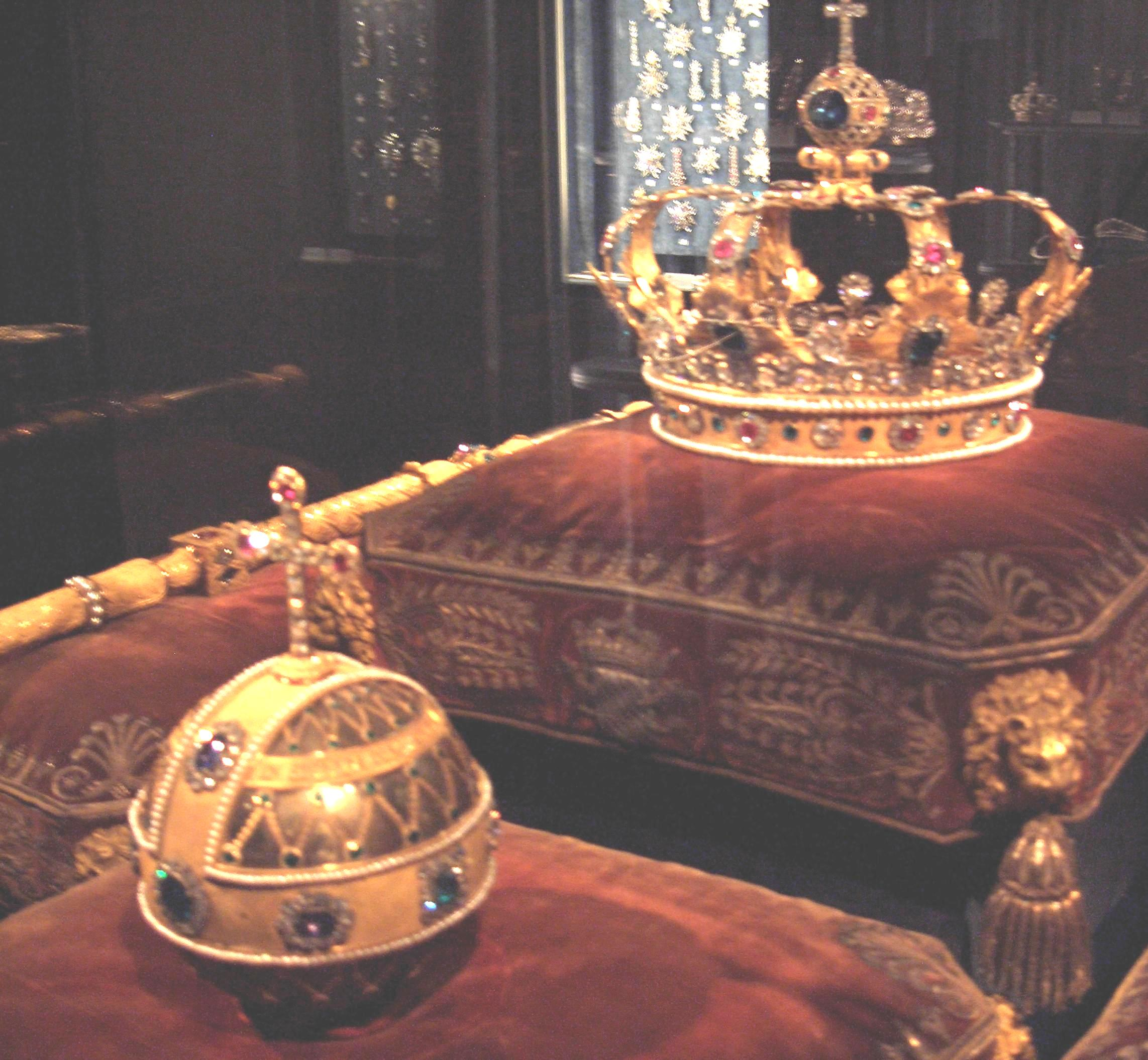 Insignien des Königreichs Bayern (angefertigt 1800-1810) in der Schatzkammer der Münchner Residenz